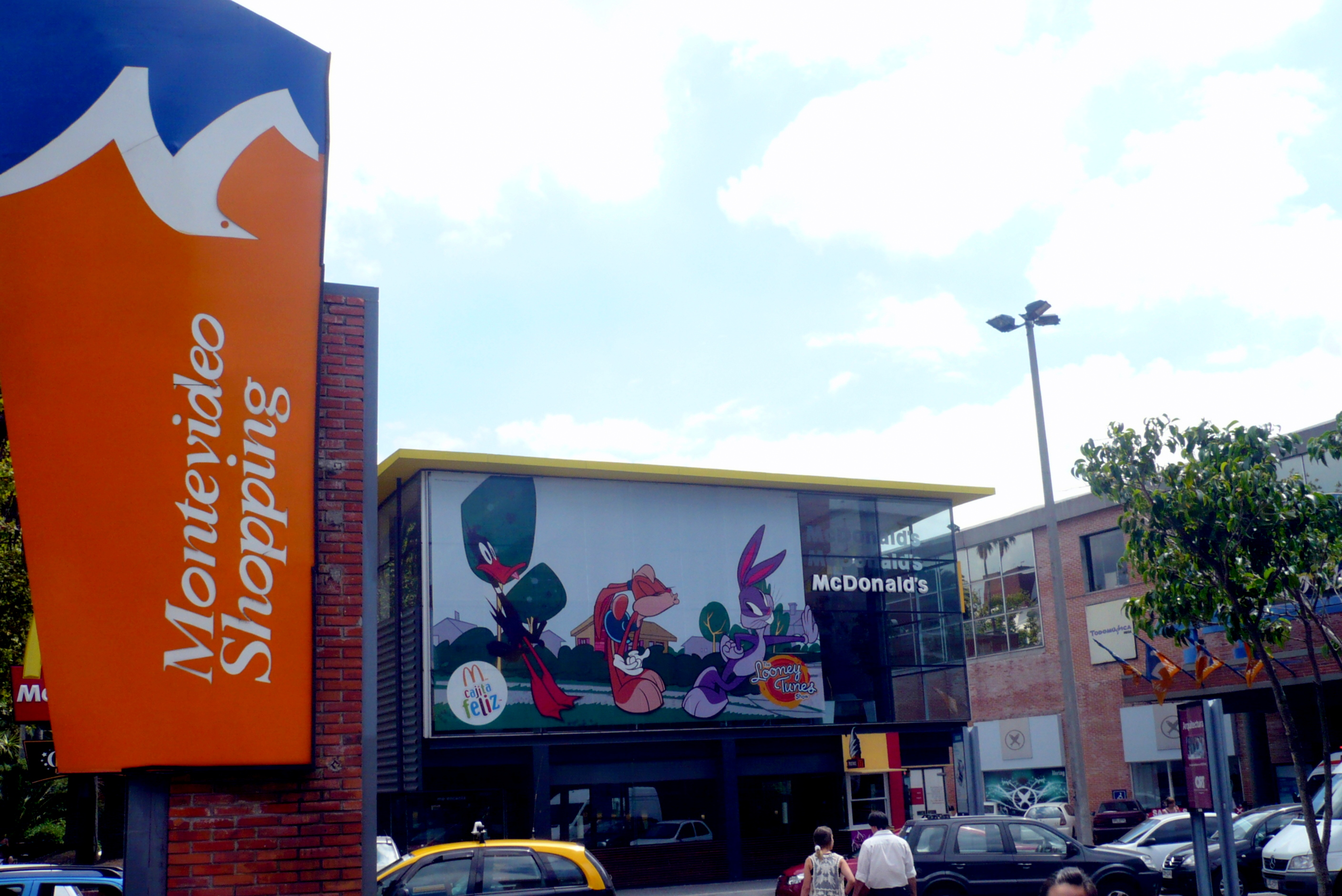 Montevideo Shopping visto desde Calle Avda Luis Alberto de Herrera